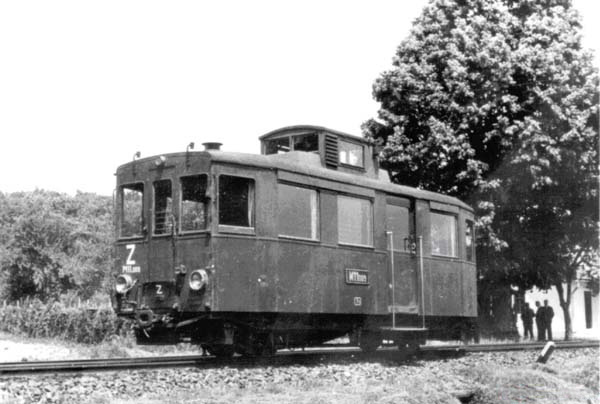 Автомотриса М11 на Боржавській вузькоколійці